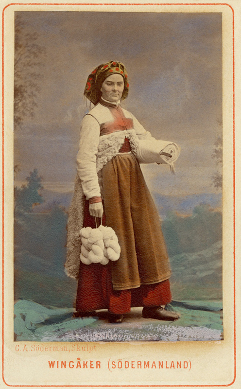 Kvinna i sockendräkt från Vingåker, Södermanland. Dräktdocka med huvud skulpterat av C A Söderman, visad på världsutställningen i Wien 1873. Handkolorerat fotografi.